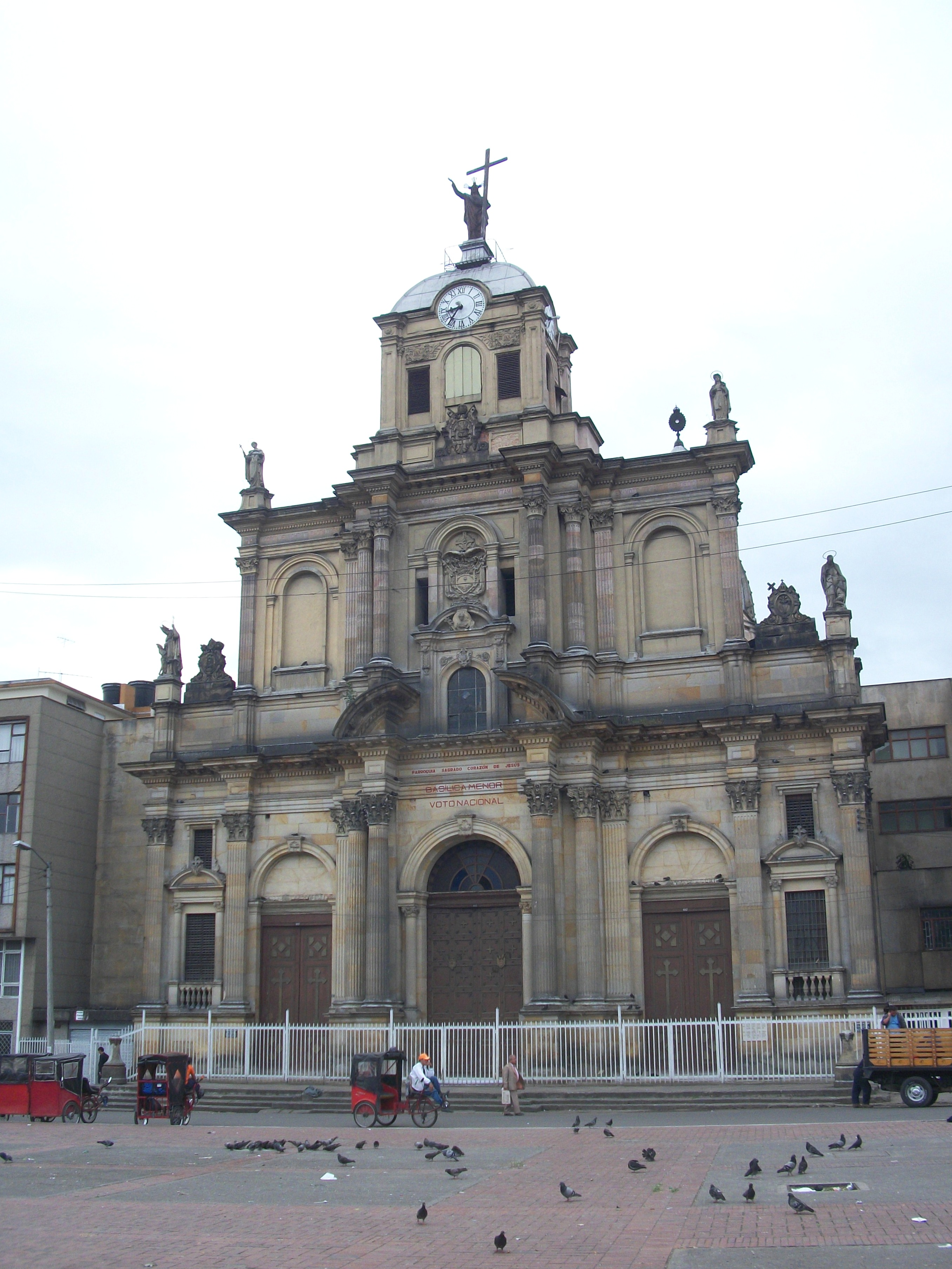 Basílica del Voto Nacional, Bogotá, Los Mártires, Carrera 15 No. 10-73.